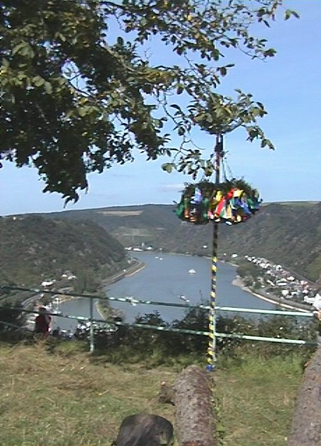 Der Kerwestrauß auf dem Wackenberg vor dem Panorama des Rheintals